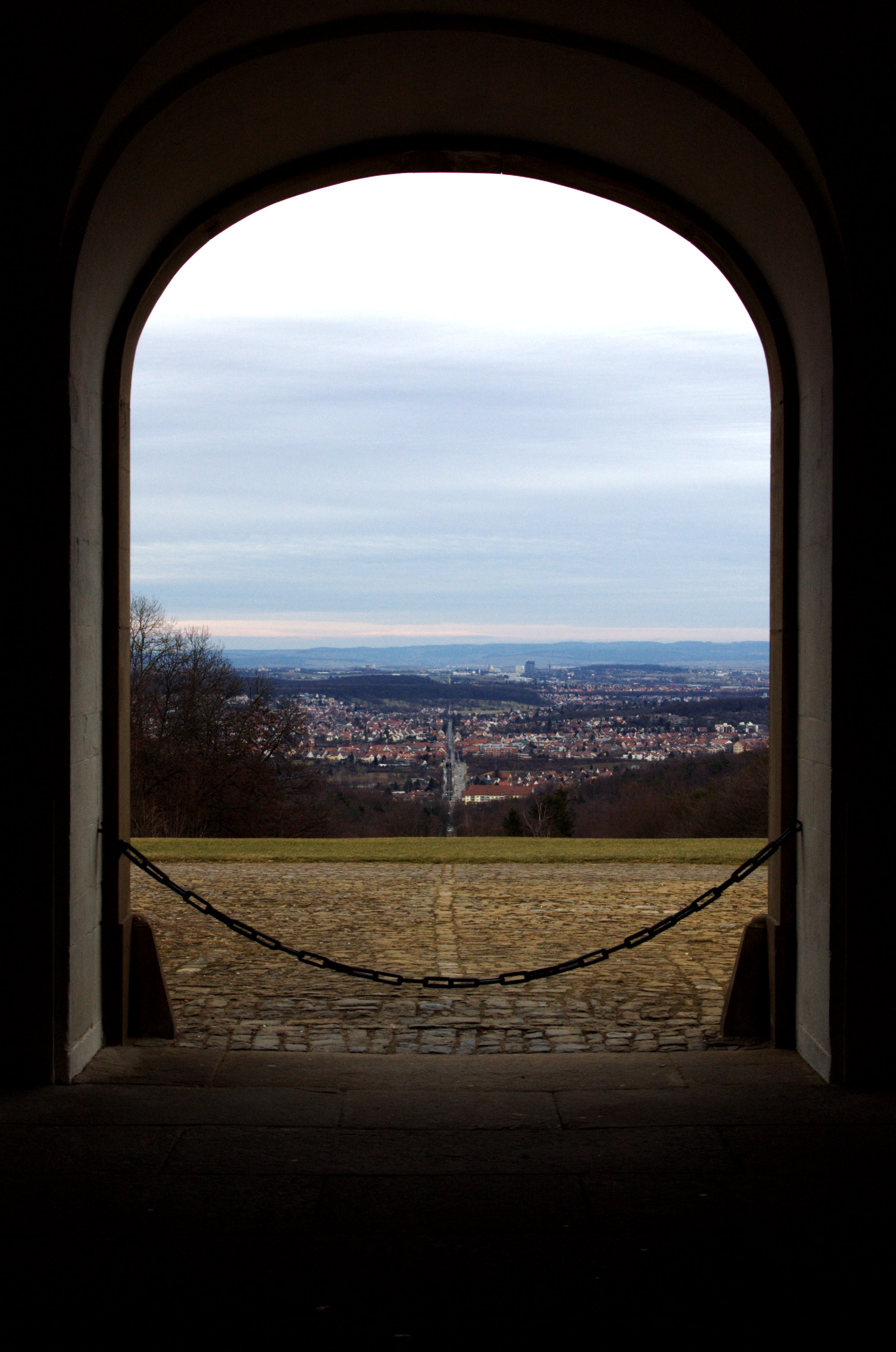 Blick vom Schloss Solitude (Stuttgart) auf die Solitudestraße (Weilimdorf) und die Solitudeallee (Ludwigsburg)